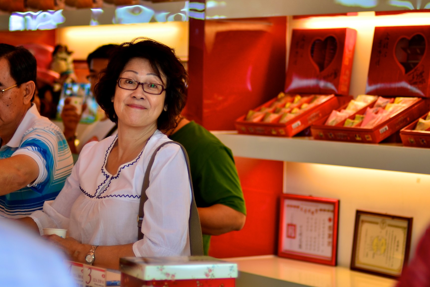 太阳饼